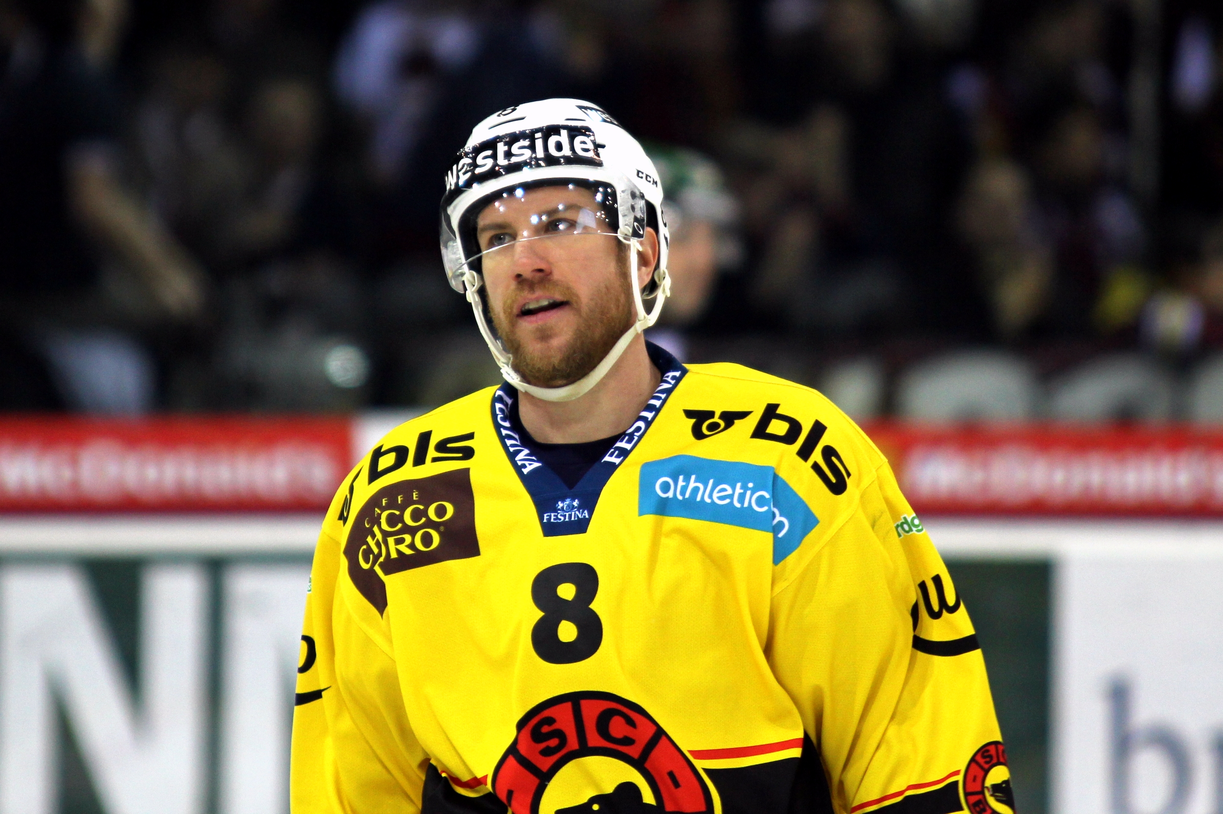 Derek Roy (B 8).